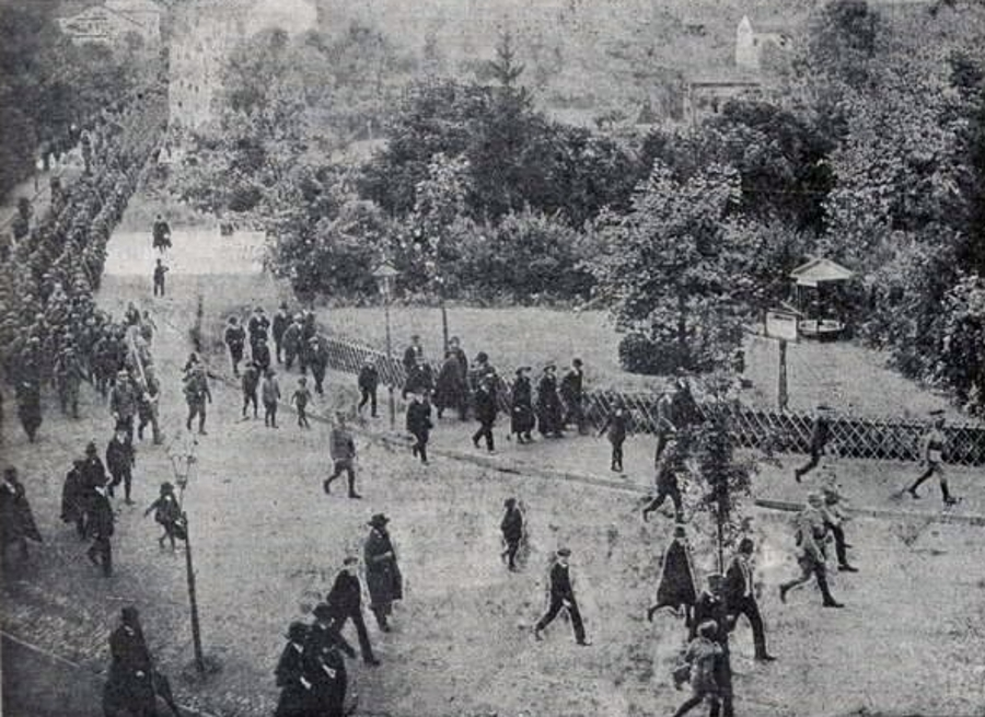 Wymarsz oddziału Legionu Śląskiego z Cieszyna 30 września 1914 roku.